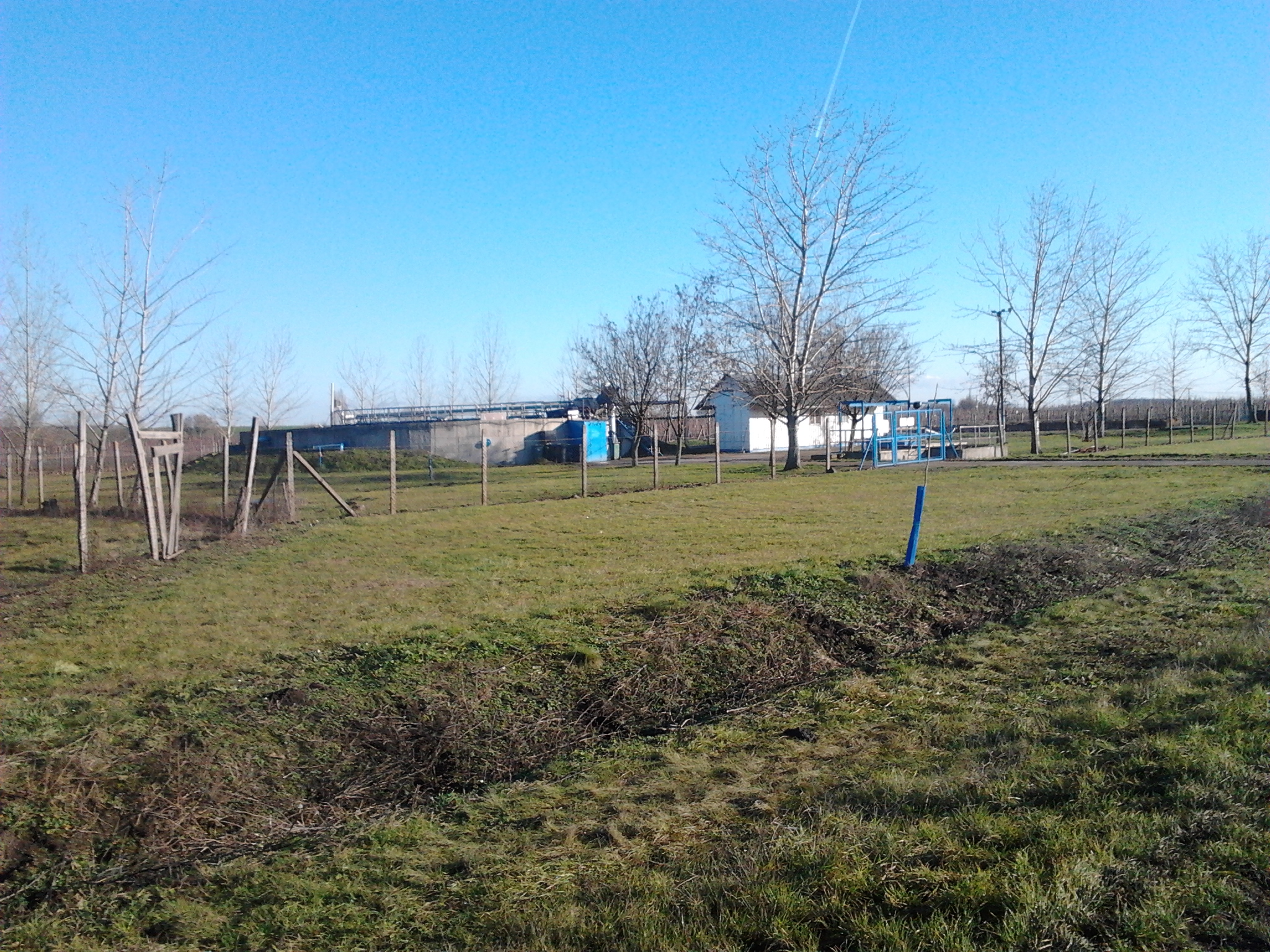 A maklári szennyvíztisztító telep.